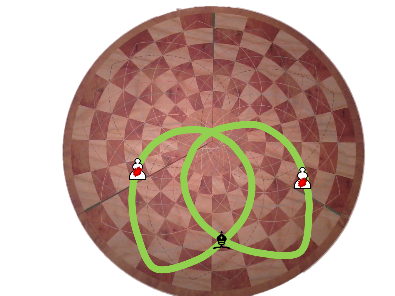 תהנו עודפעם!